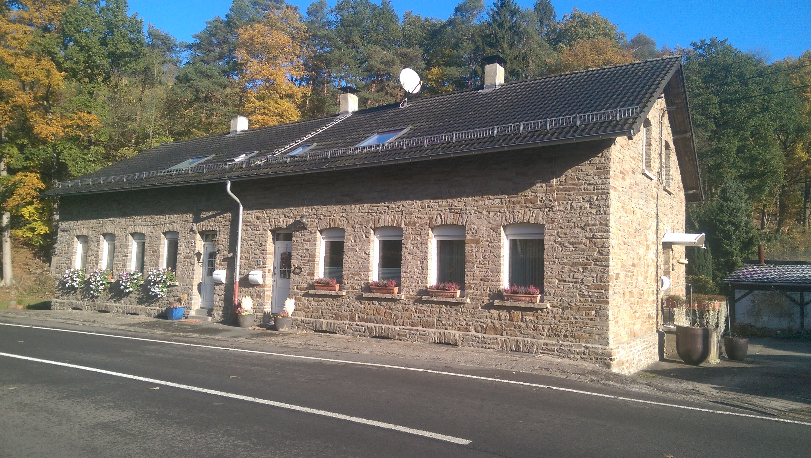 Velbert, Hefel, Hespertal 3, Sandsteingebäude